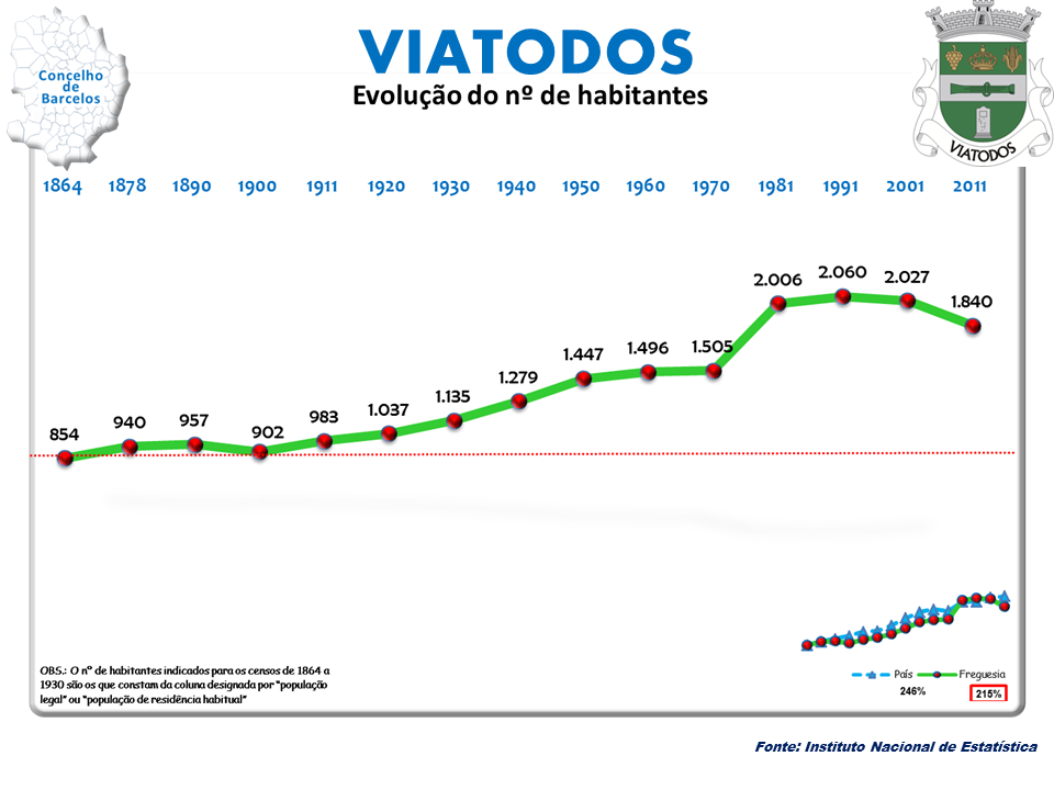 Censos 1864/2011